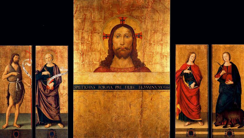 La tabla central representa a Jesucristo, en las dos tablas de la izquierda aparecen San Juan Bautista y San Pedro Apóstol, y en las dos de la derecha San Juan Evangelista y Santa Columba de Sens.